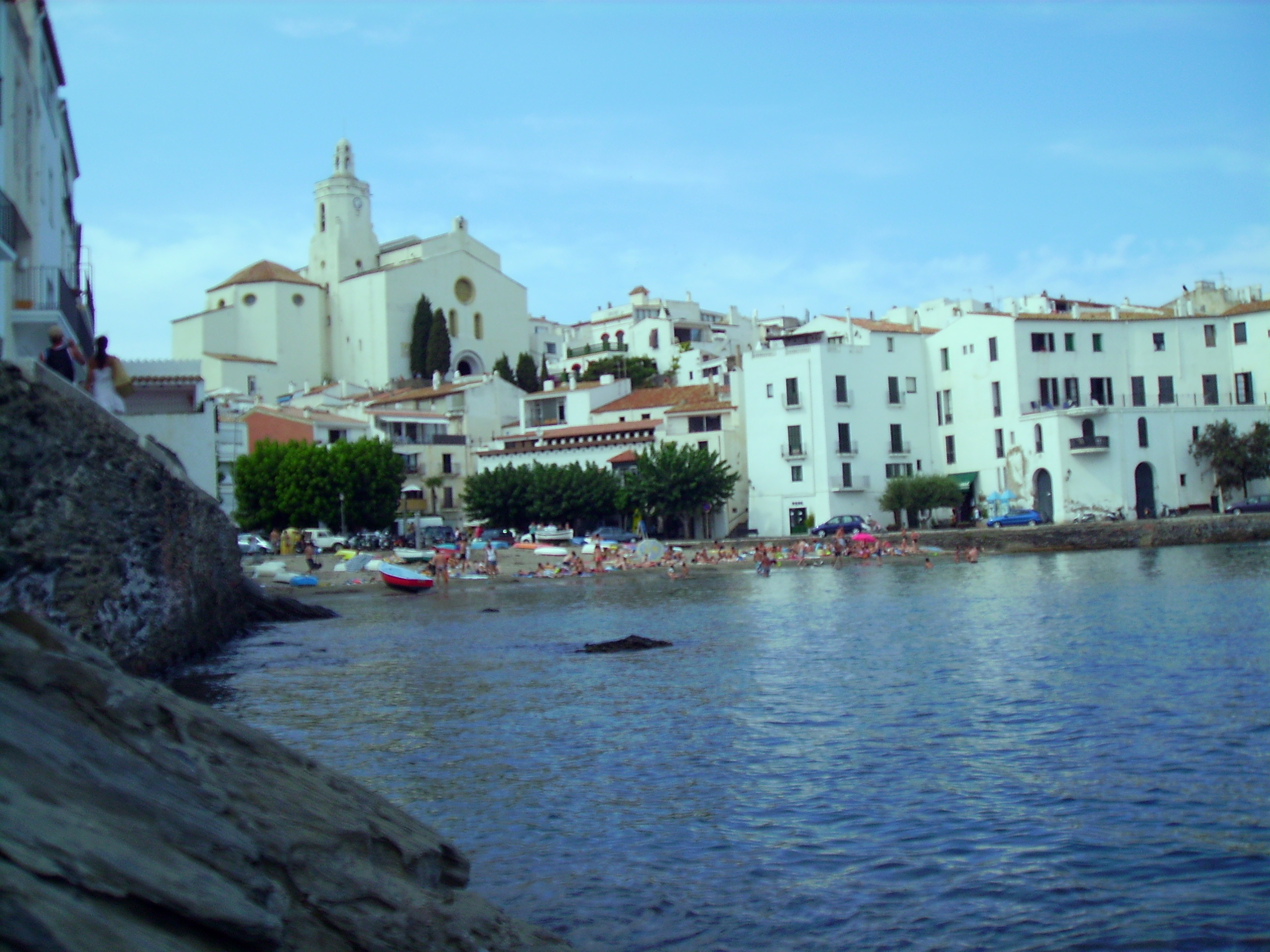 Es Port Dogué, a l'esquerra la Riba Pitxot, Cadaqués